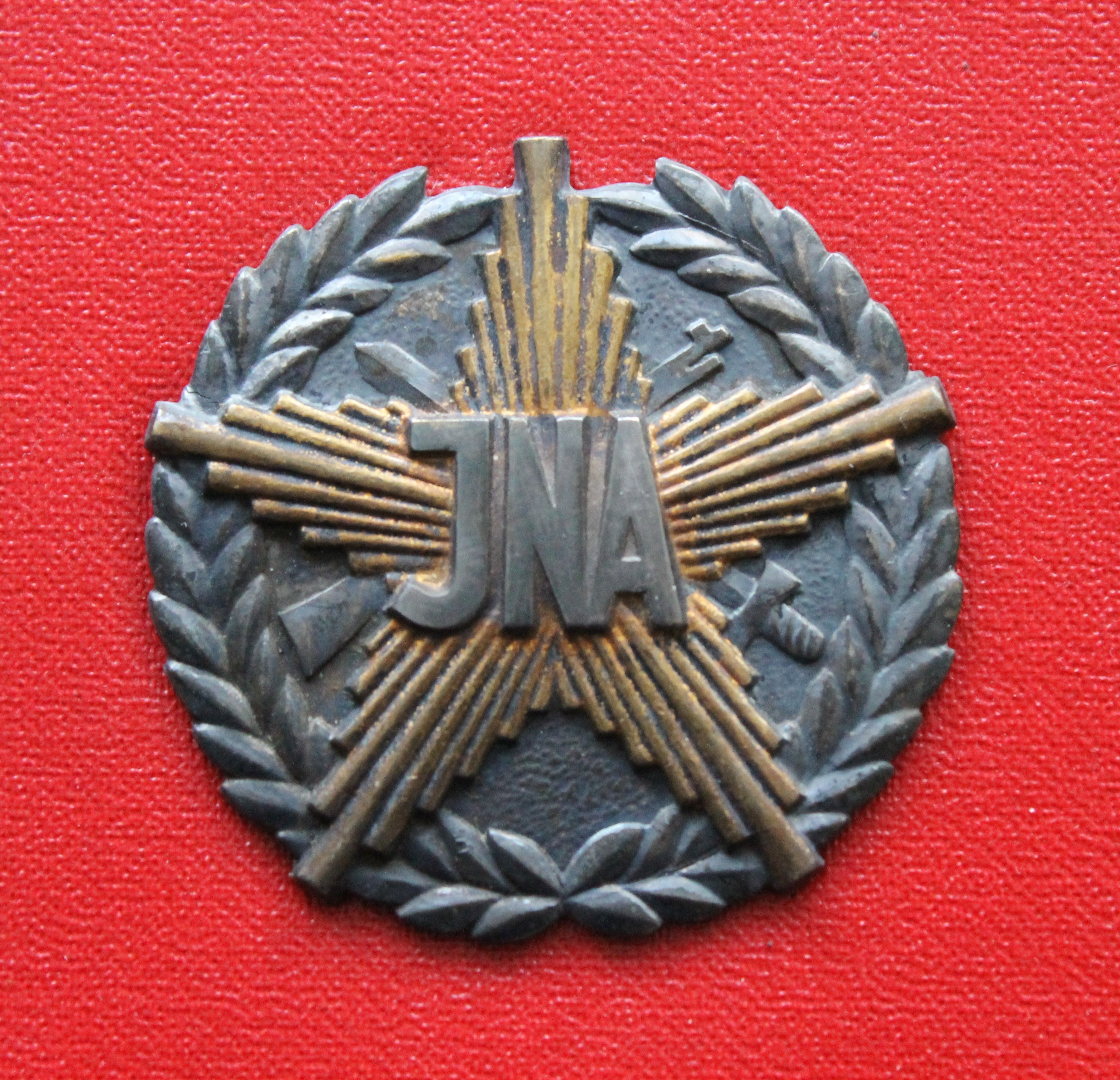 Амблем Југословенске народне армије (ЈНА)